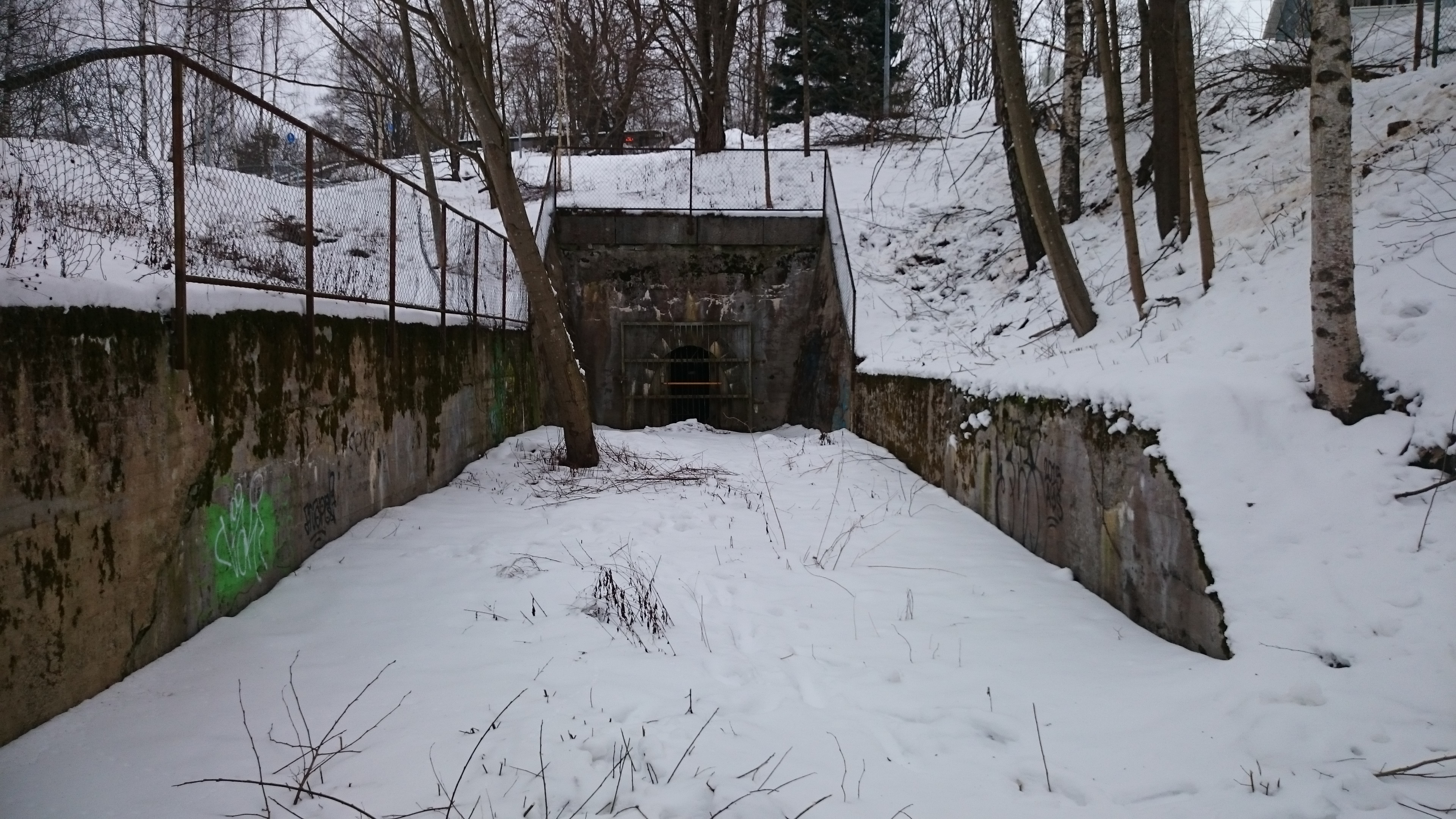 Pispalan vanha uittotunneli